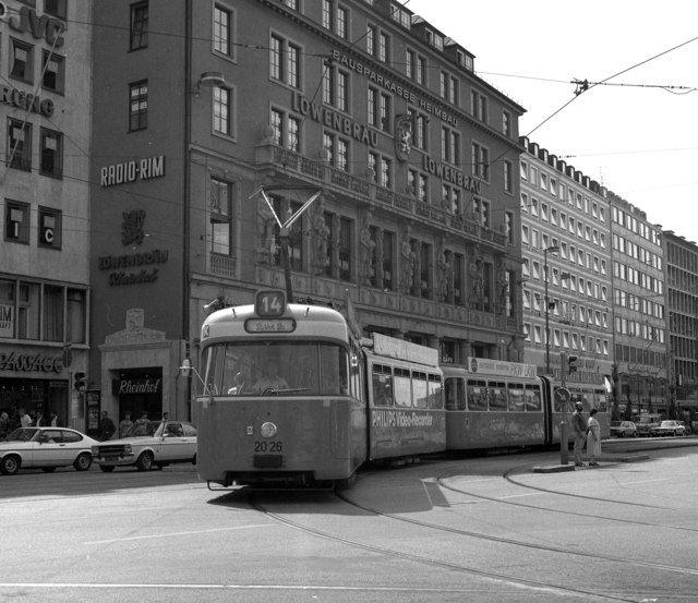 Outside Munich Hbf